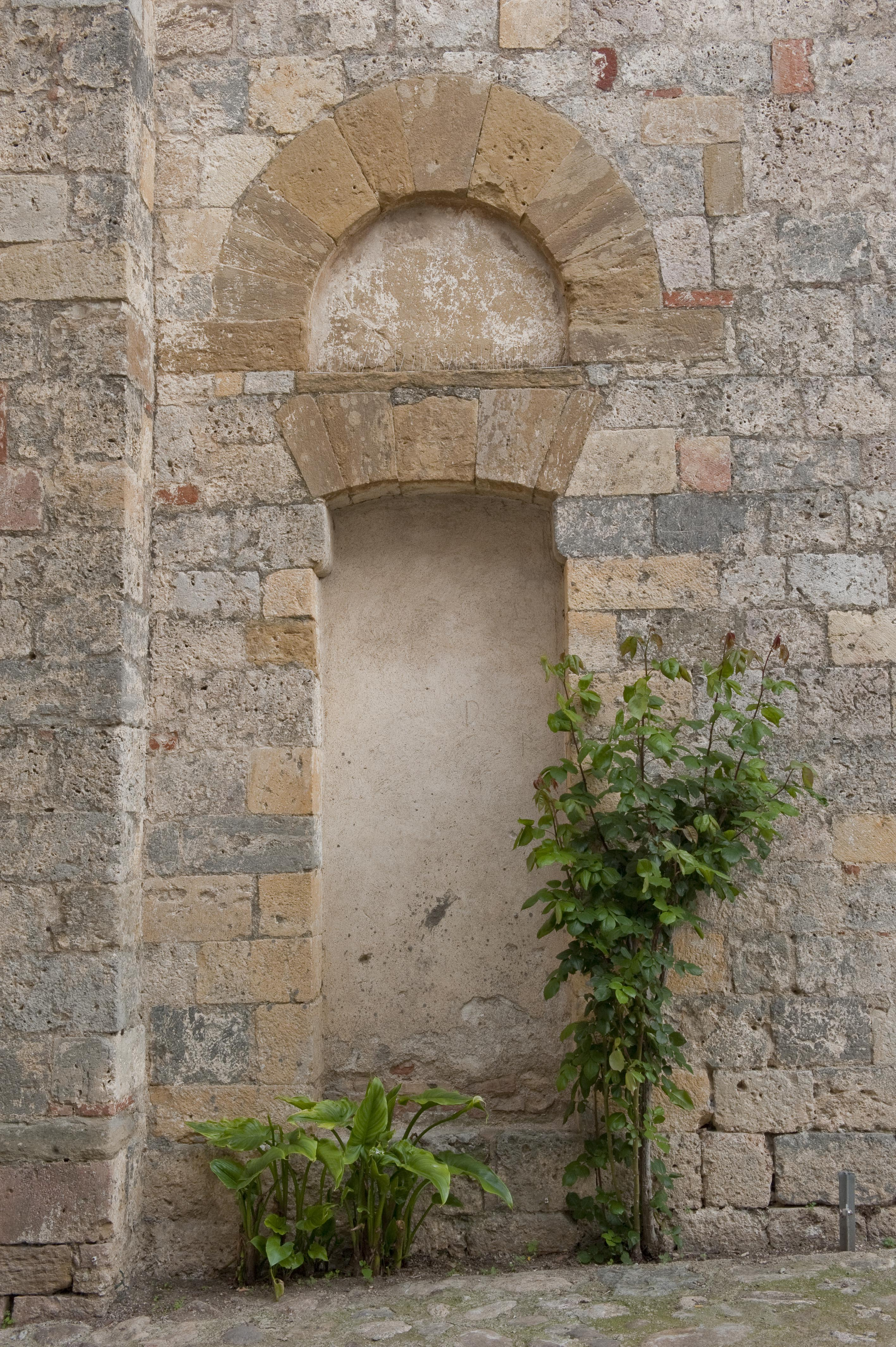 Portale laterale (tamponato) della chiesa di Santa Maria Assunta a Monteriggioni (Siena)